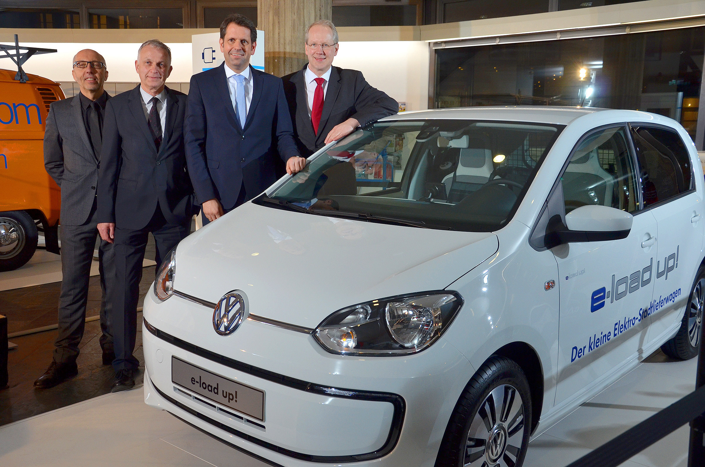 Während der Pressekonferenz vor der Talkrunde zur Eröffnung der Ausstellung Hannover aufgeladen! Elektromobilität zwischen Wunsch und Wirklichkeit vom 10. Februar bis 13. Juni 2015 (zugleich die diesjährige Nacht der Museen) im Historischen Museum Hannover postierten sich hinter dem neuen Volkswagen e-load up!, laut Aufschrift „Der kleine Elektro-Stadtlieferwagen“ (von links): Raimund Nowak (Geschäftsführer der Metropolregion Hannover-Braunschweig-Göttingen-Wolfsburg, Prof. Dr.-Ing. Jürgen Leohold (Leiter Konzernforschung und Leiter der AutoUni der Volkswagen AG in Wolfsburg), Olaf Lies (Niedersächsischer Minister für Wirtschaft, Arbeit und Verkehr) und der Oberbürgermeister der Landeshauptstadt Hannover, Stefan Schostok ...